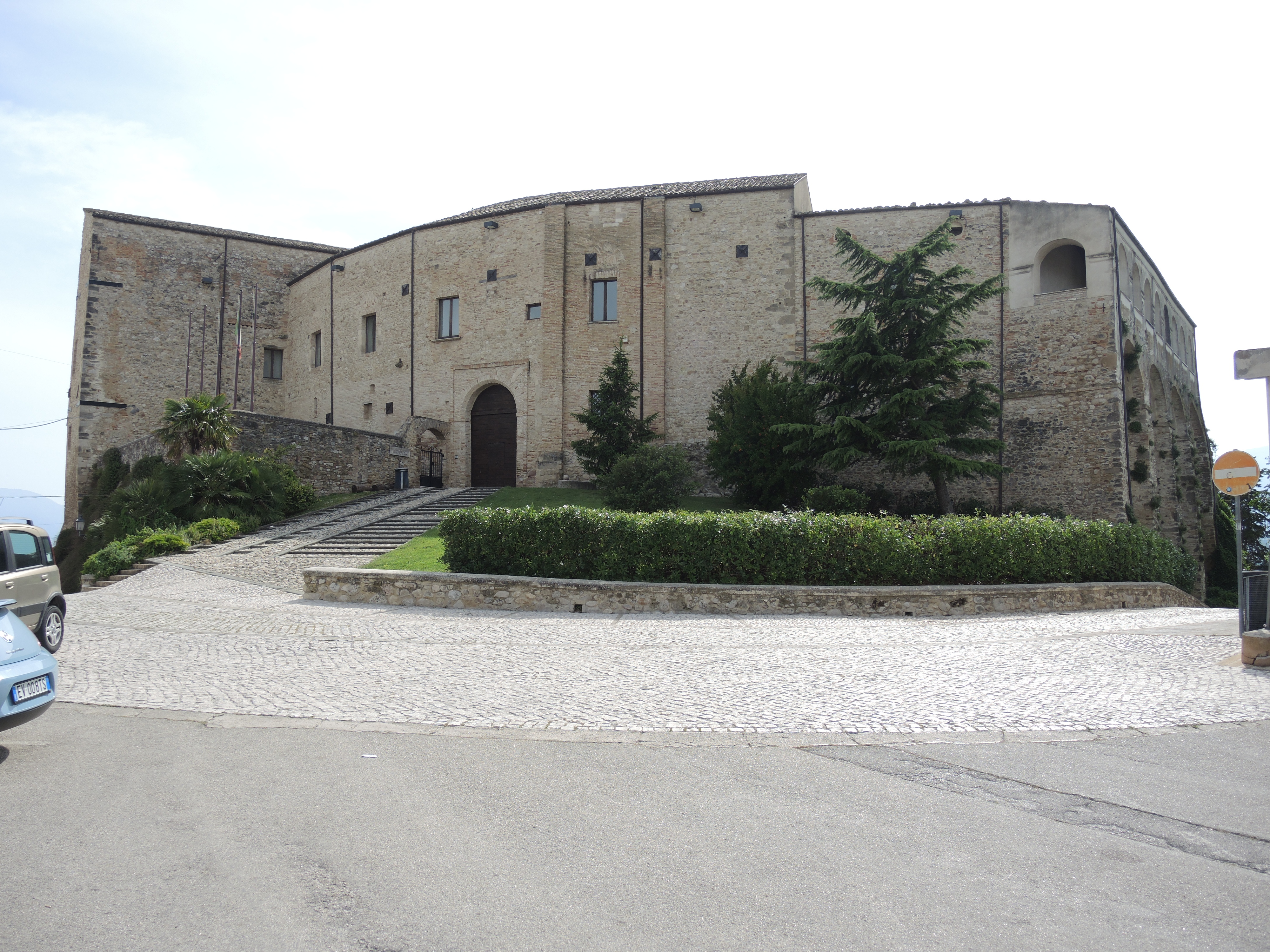 Nocciano (PE): Castello De Sterlich-Aliprandi